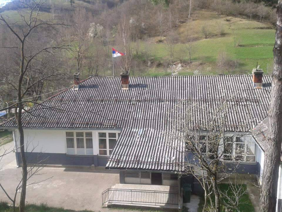 Основна школа ,,Шарски Одред" у Врбештици